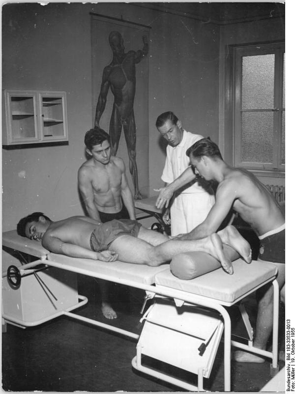 Leipzig, DHfK, Massageunterricht Zentralbild Müller-Bey-Ho. 19.10.1955 5 Jahre Deutsche Hochschule für Körperkultur. UBz: In hellen und geräumigen Massageräumen werden die Studenten in der Sportmassage ausgebildet. (Siehe unseren Begleittext: "5 Jahre Deutsche Hochschule für Körperkultur").